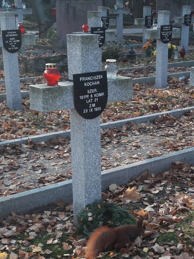 Cmentarz Wojskowy na Powązkach - grób Franciszka Kochana, żołnierza 10 pułku piechoty, poległego w 1920 r.